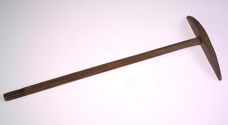 Tige circulaire munie d'une palette semi-circulaire à son extrémité. Dimensions , largeur 15,2 cm, longueur 36,6 cm, épaisseur 4 cm. Matériau : bois.